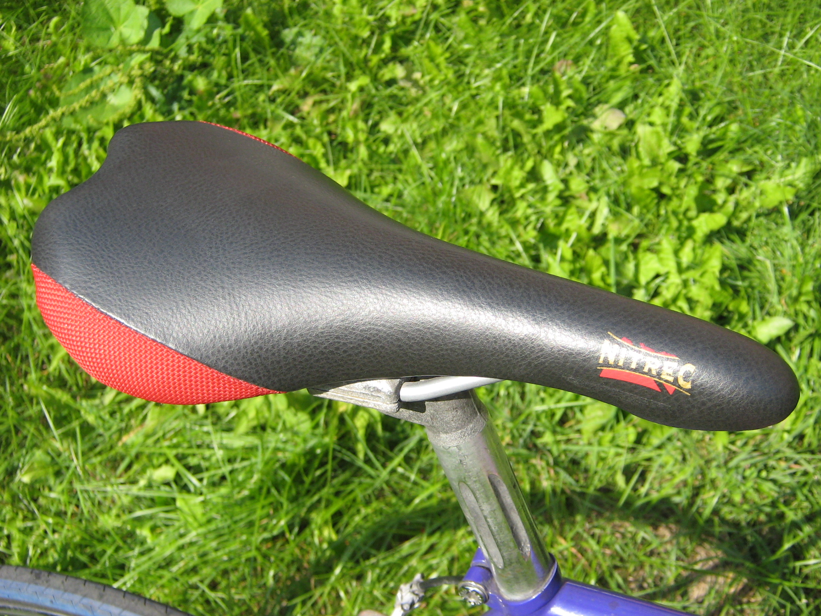 Siodełko kolarskie-szosowe Gipiemme